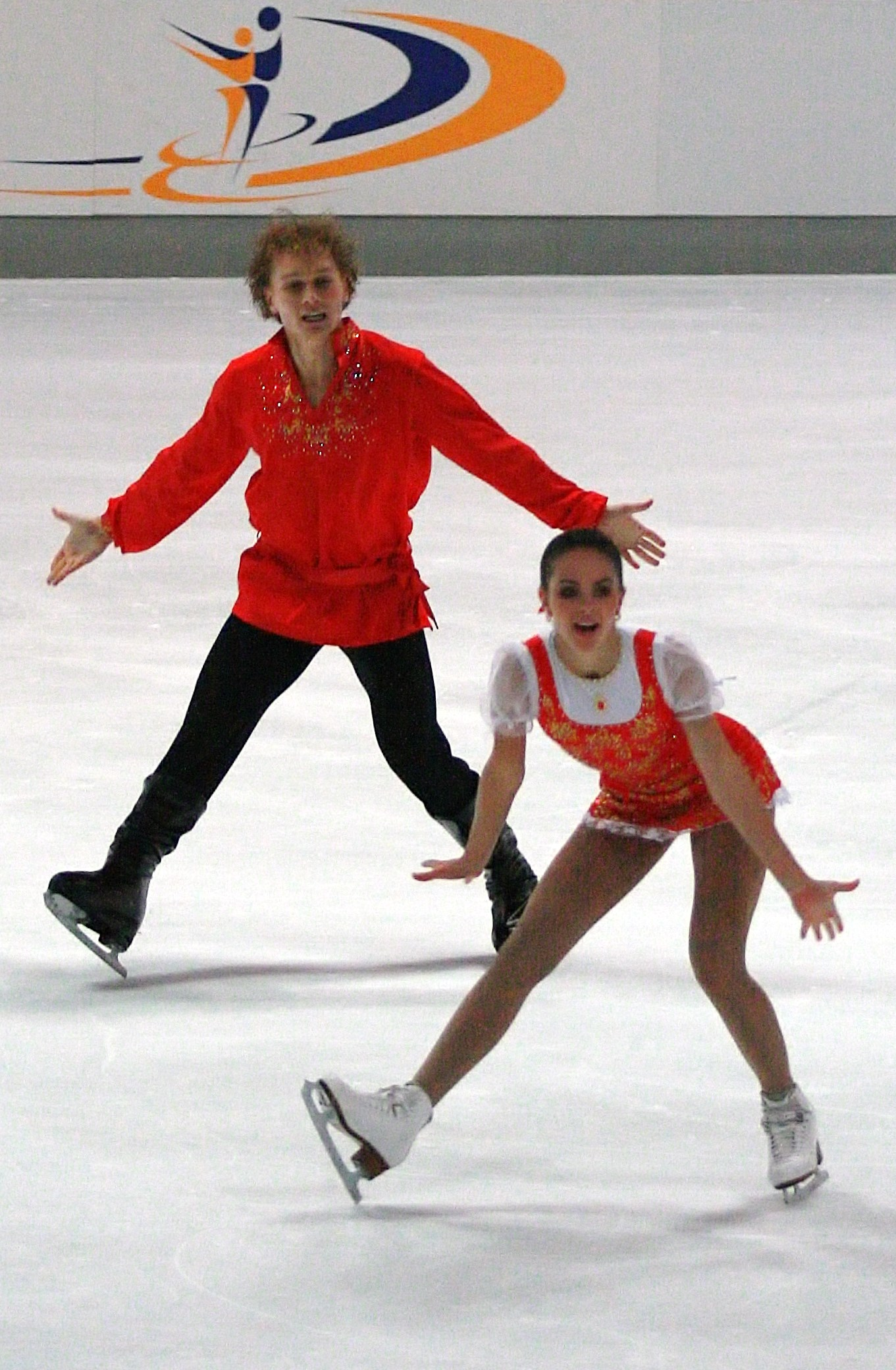 Наталья Забияко и Александр Забоев (Эстония) на 2013 Nebelhorn Trophy